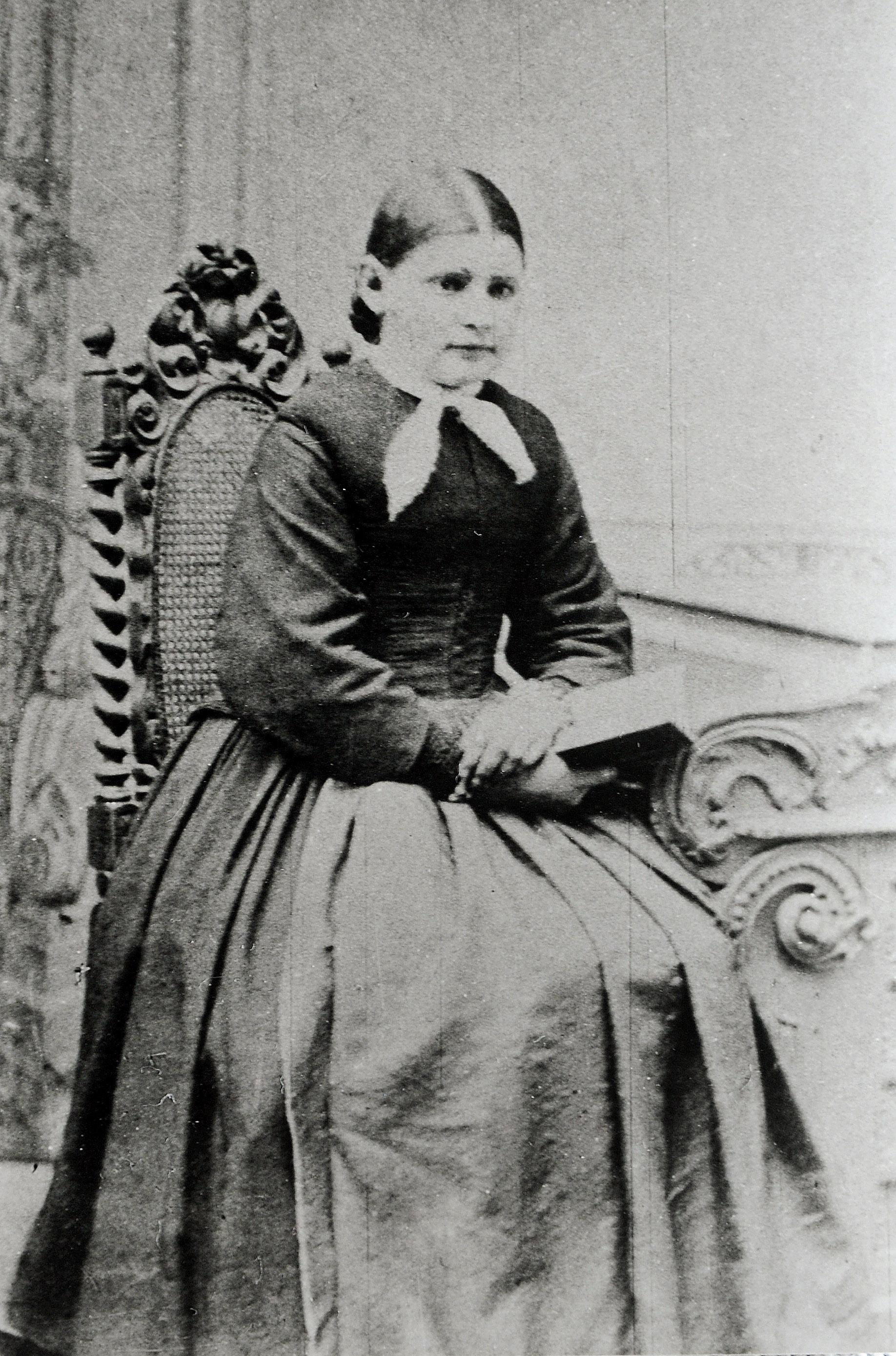 Maria Bernarda Bütler als 17jähriges Mädchen in Auw